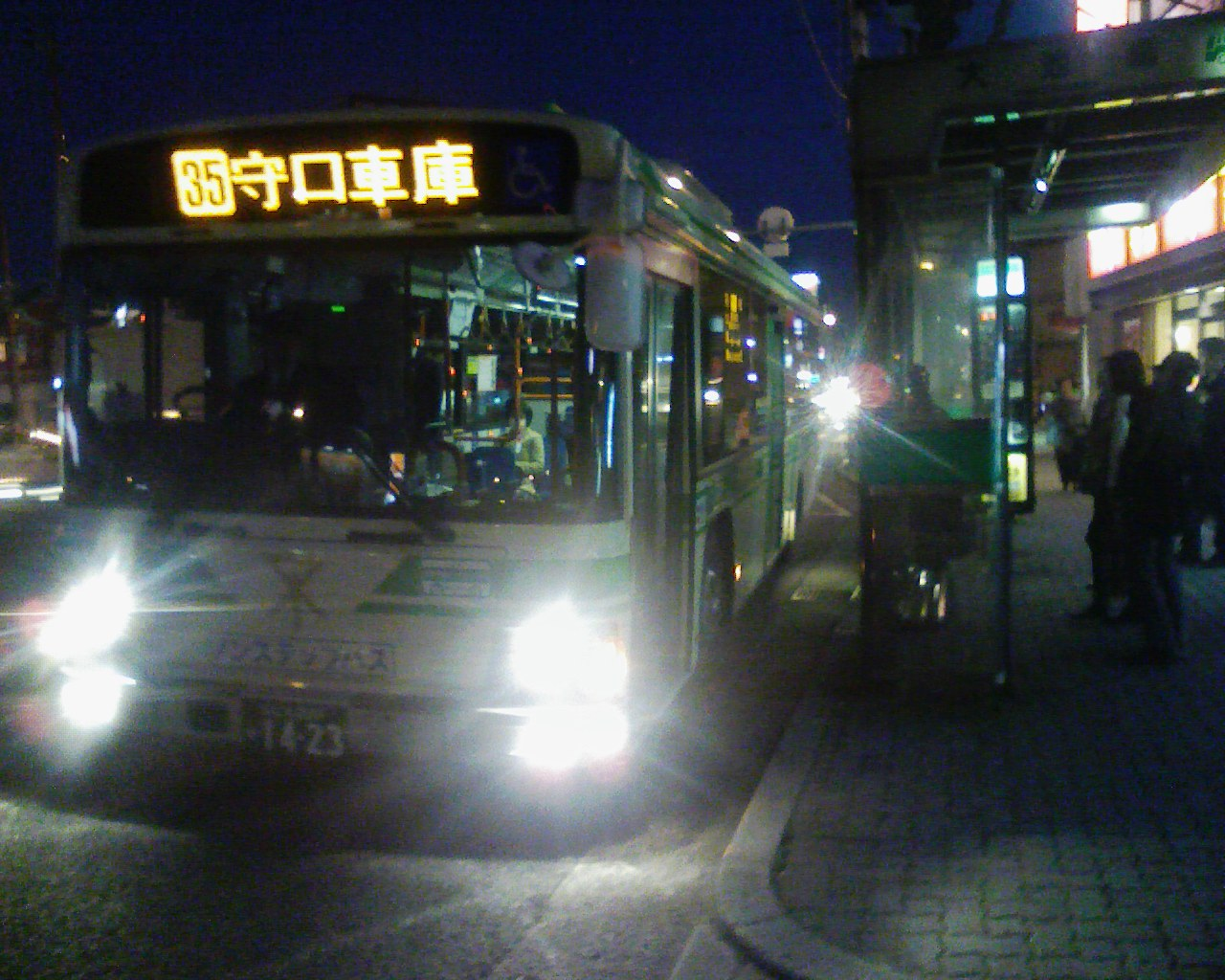 35号系統杭全発守口車庫前行（東成担当）2010年3月30日18:41大池橋バス停にて撮影